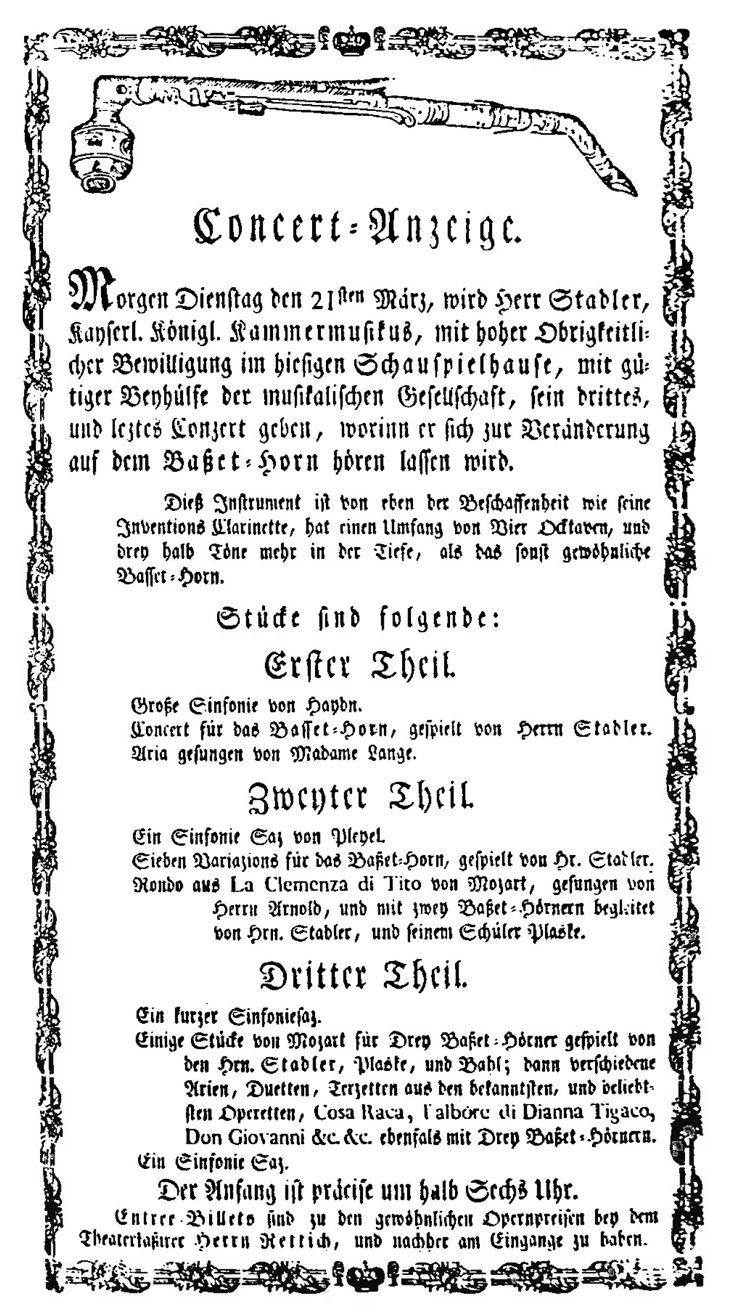 Programmzettel des Konzerts von Anton Stadler vom 21. März 1794 in Riga mit der Abbildung einer Bassettklarinette.